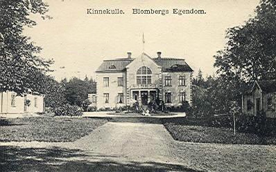 Blombergs säteri. Arkitekt Thor Thorén